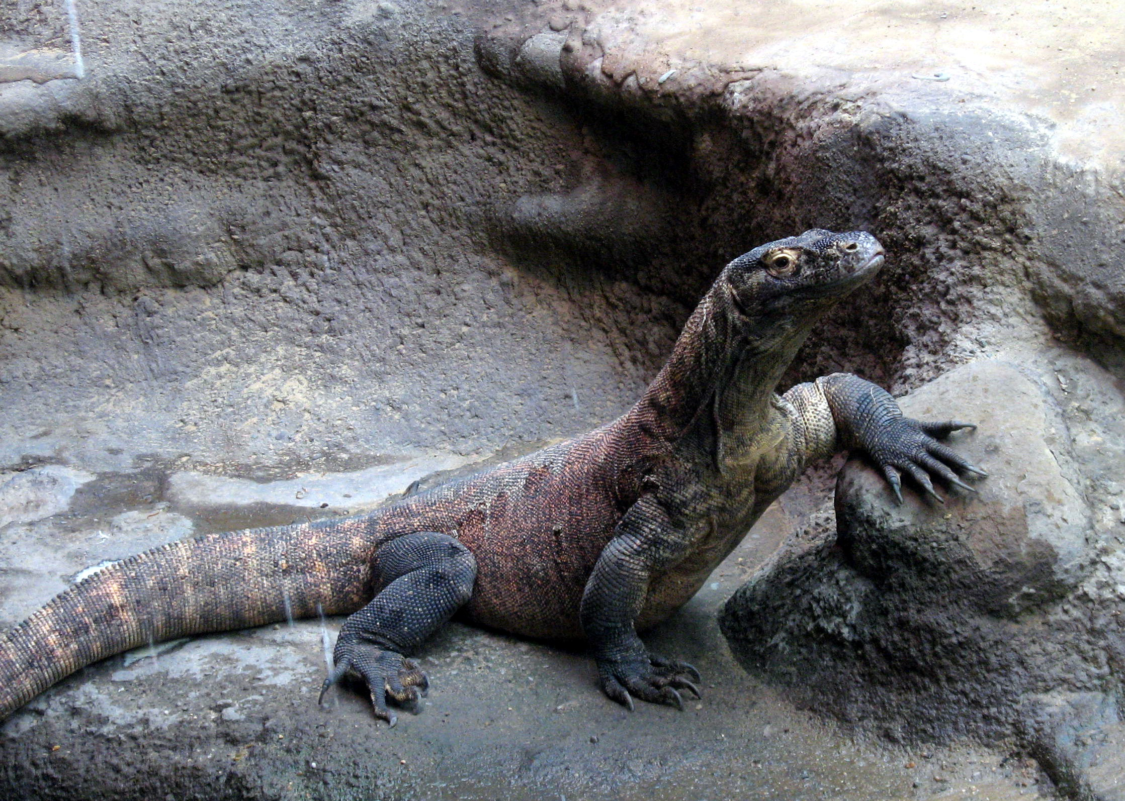 Varanus komodoensis